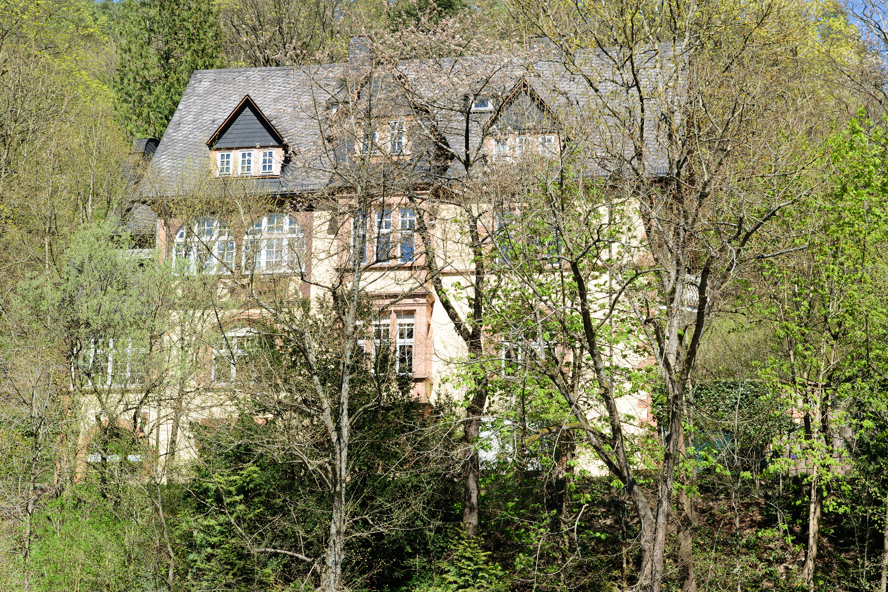 Ehem. Direktorenvilla in Ludwigshütte (Biedenkopf); ursprünglich zugehörig der ehemaligen Eisenhütte/dem späteren Zweigwerk der Buderus'schen Eisenwerke Wetzlar auf der gegenüber liegenden Lahnseite.